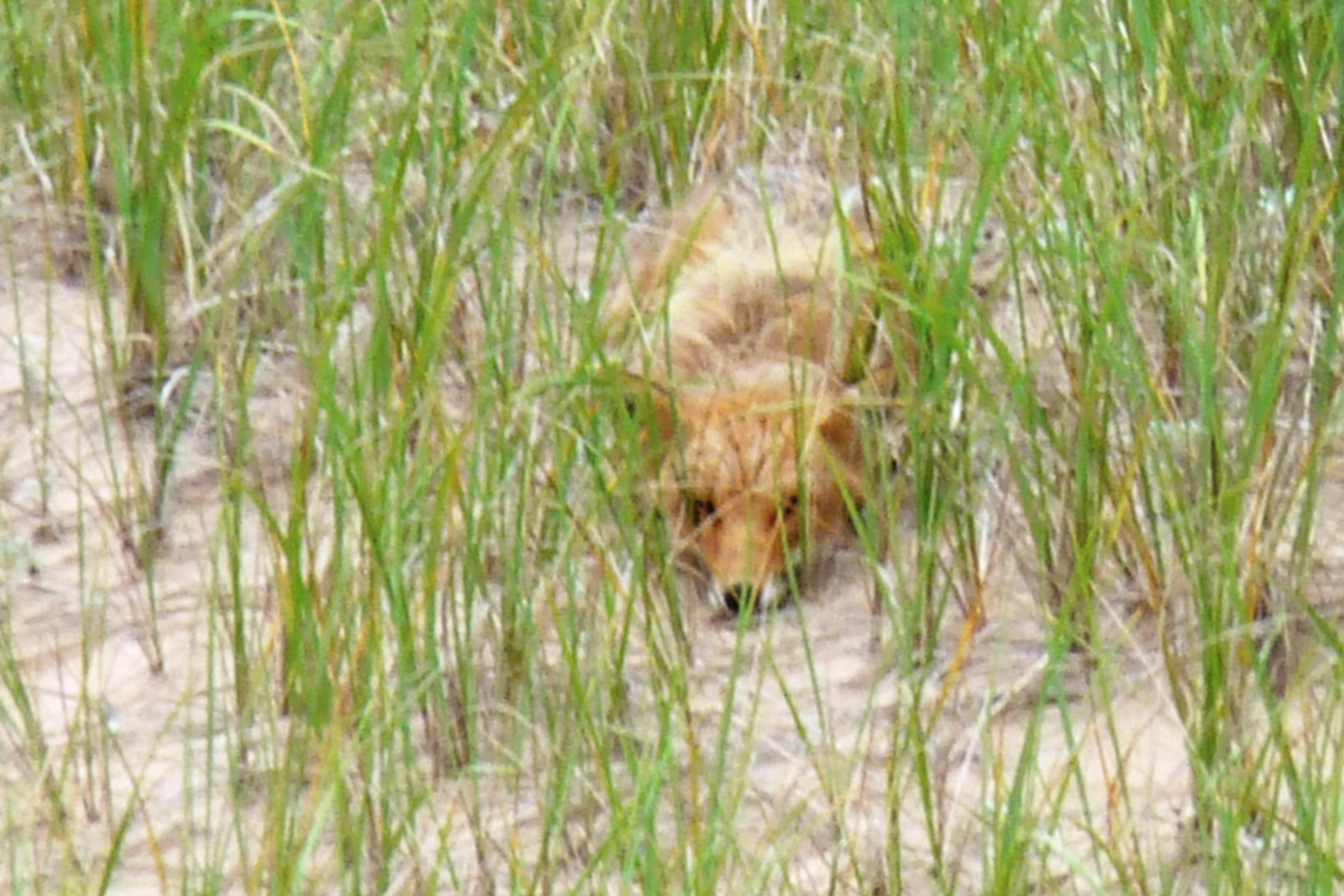 Un renard tapi dans les herbes hautes (dunes de la RNF Pointe de l'Est)